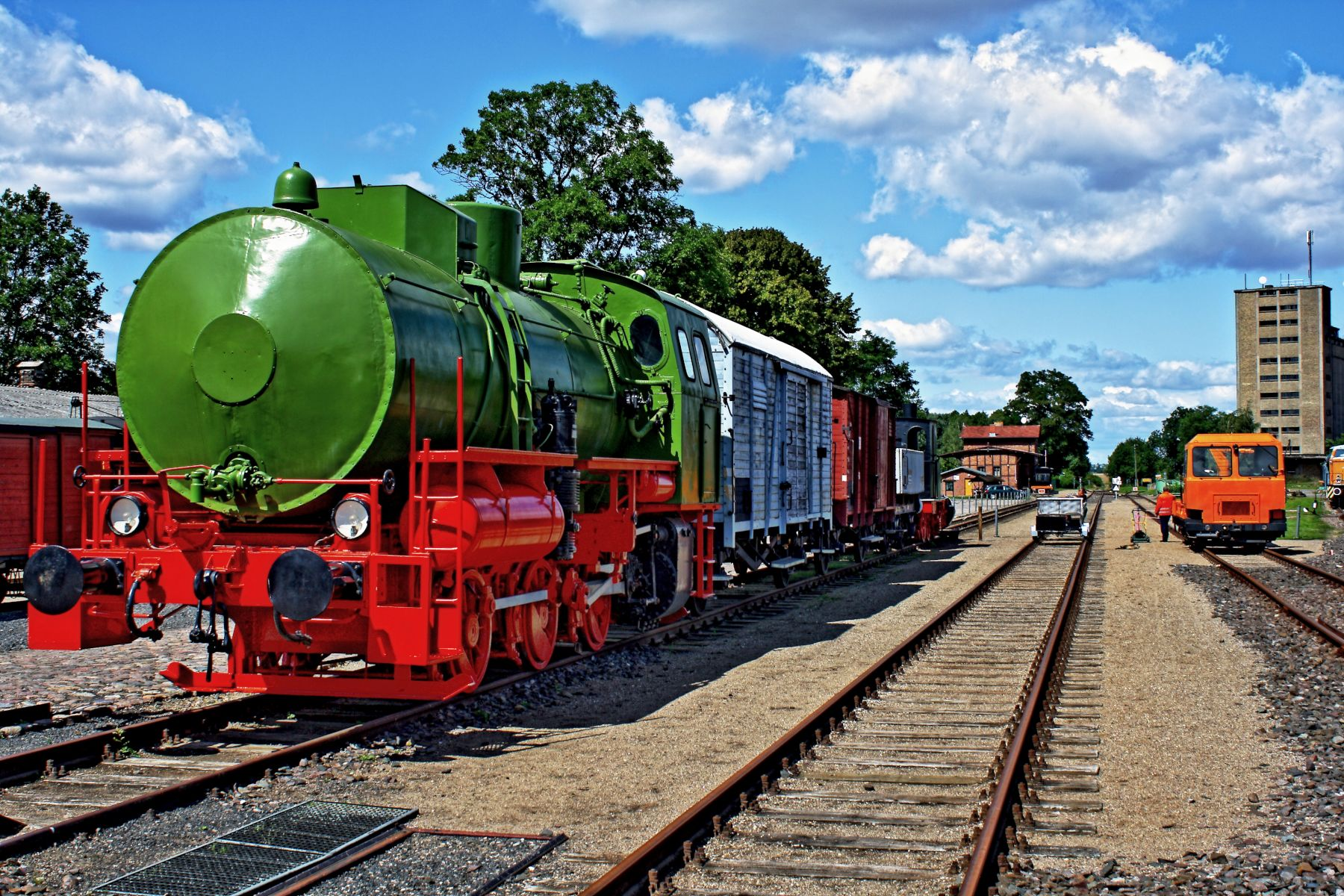 Eisenbahnmuseum Gramzow - Dampfspeicherlok der PCK Raffinerie GmbH